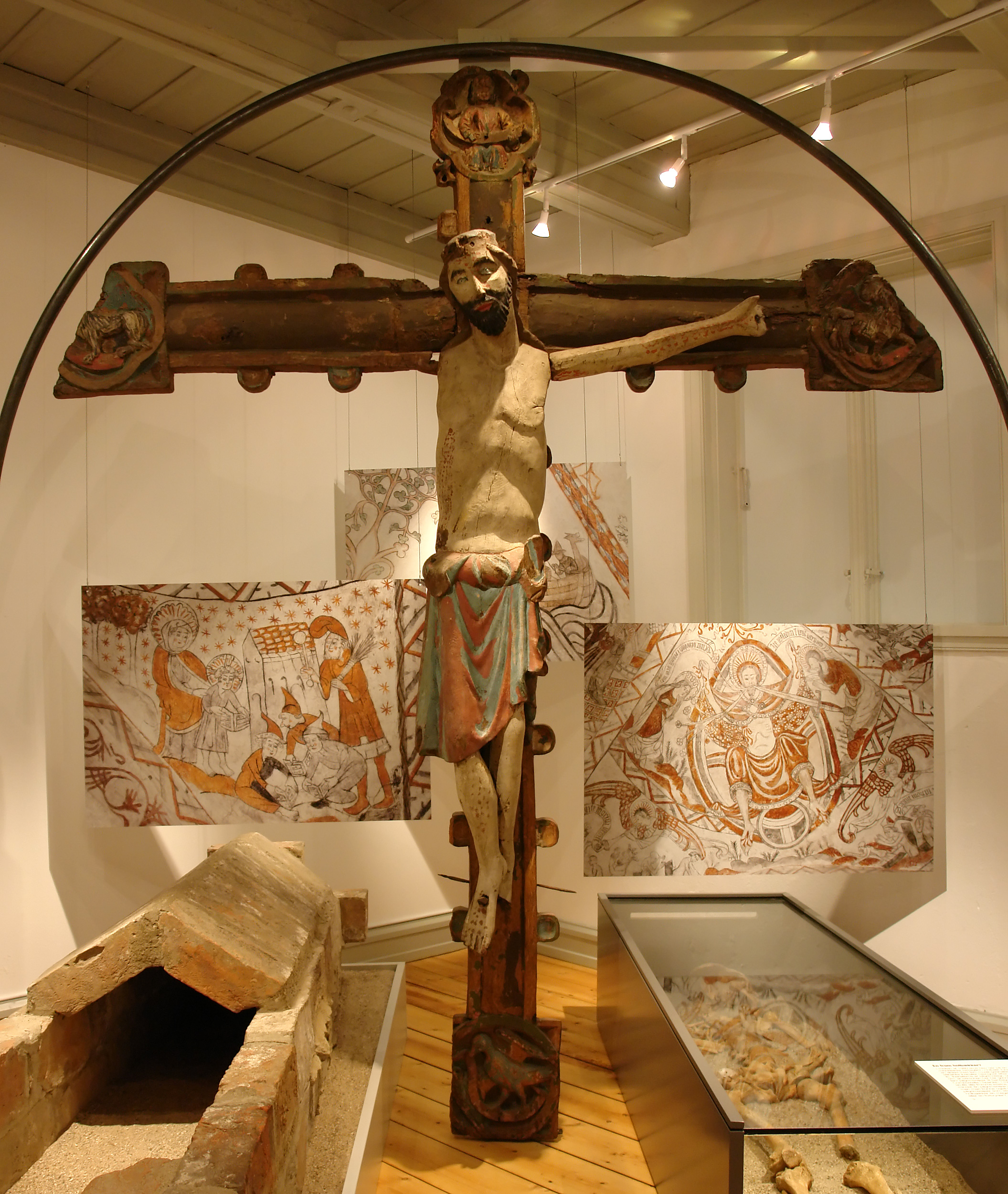 Holbæk Museum: Triumphkreuz aus der Kirche von Tuse (um 1250). Kreuz 253 cm hoch, Figur 159 cm.